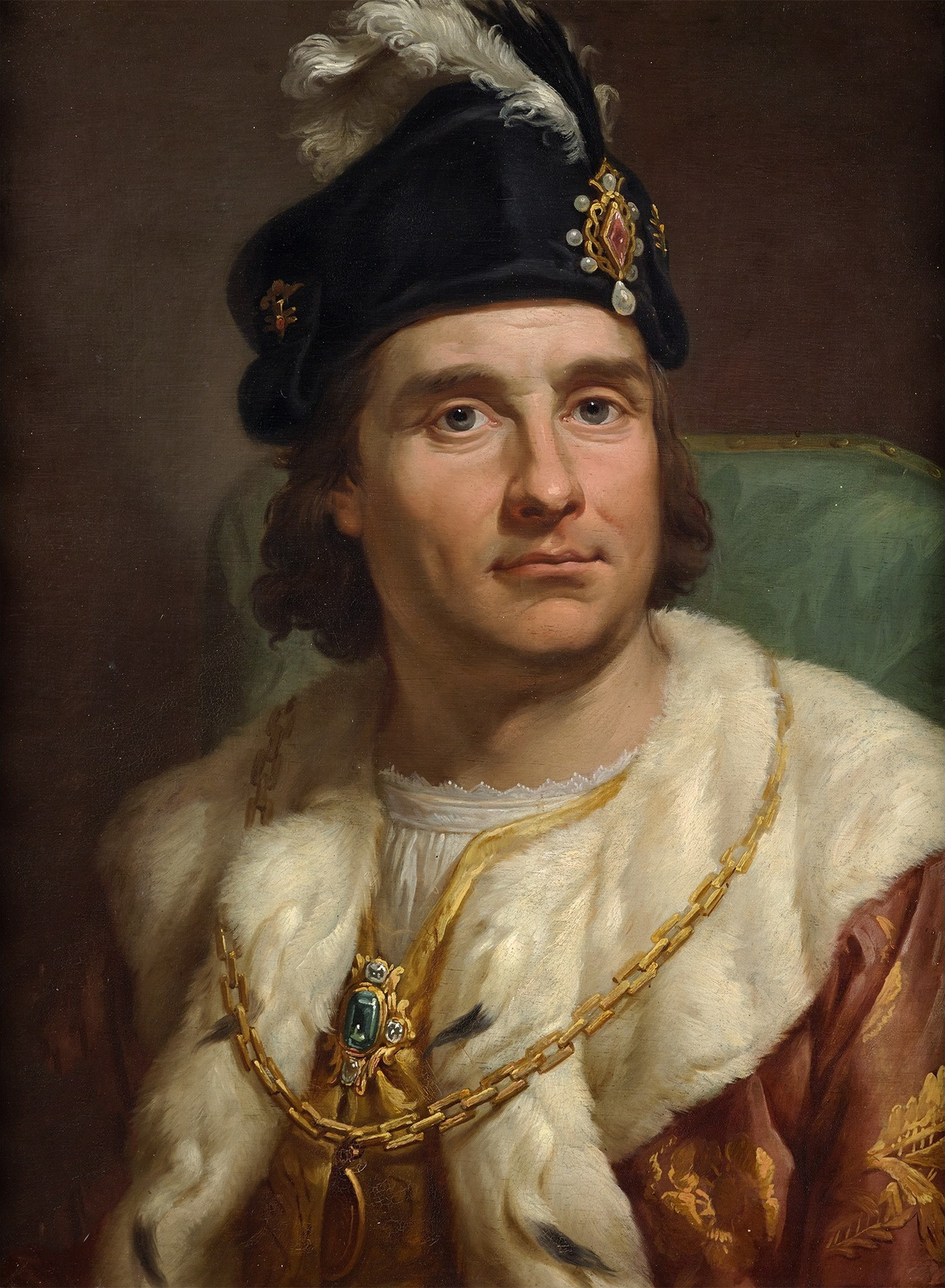 Jan I Olbracht